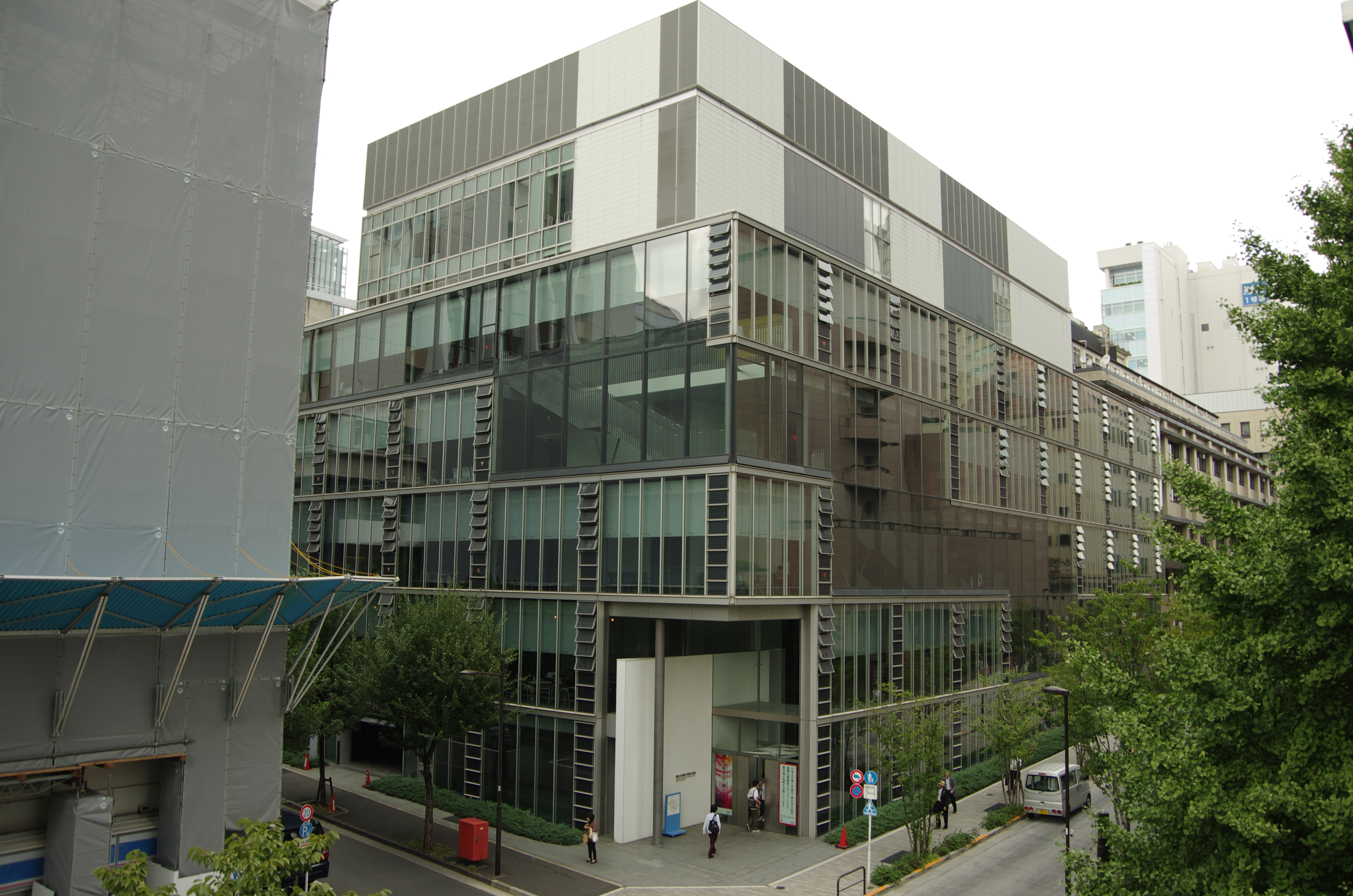 日本大学理工学部駿河台キャンパス1号館